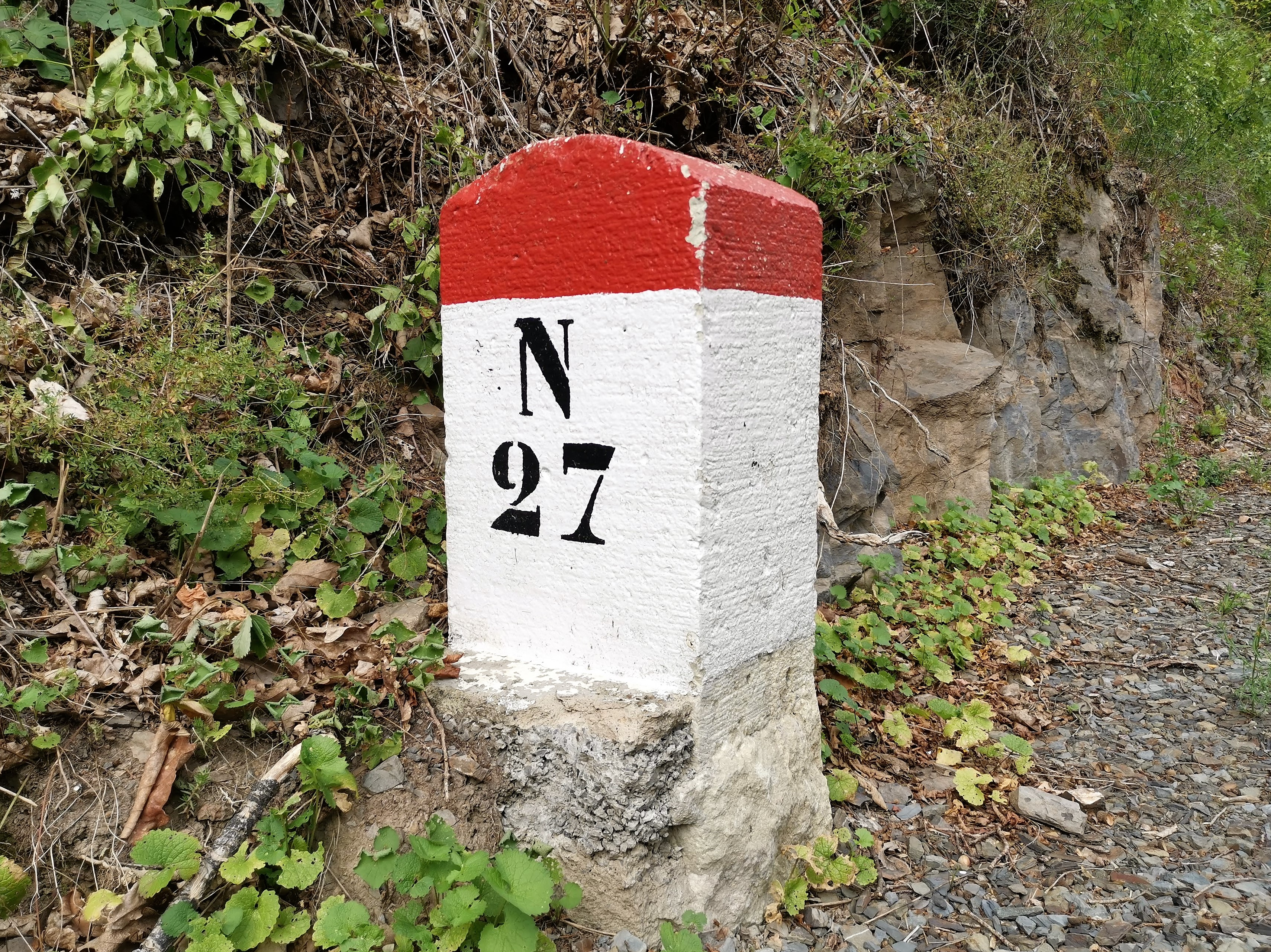 Borne kilométrique N27 près d'Esch-sur-Sûre.